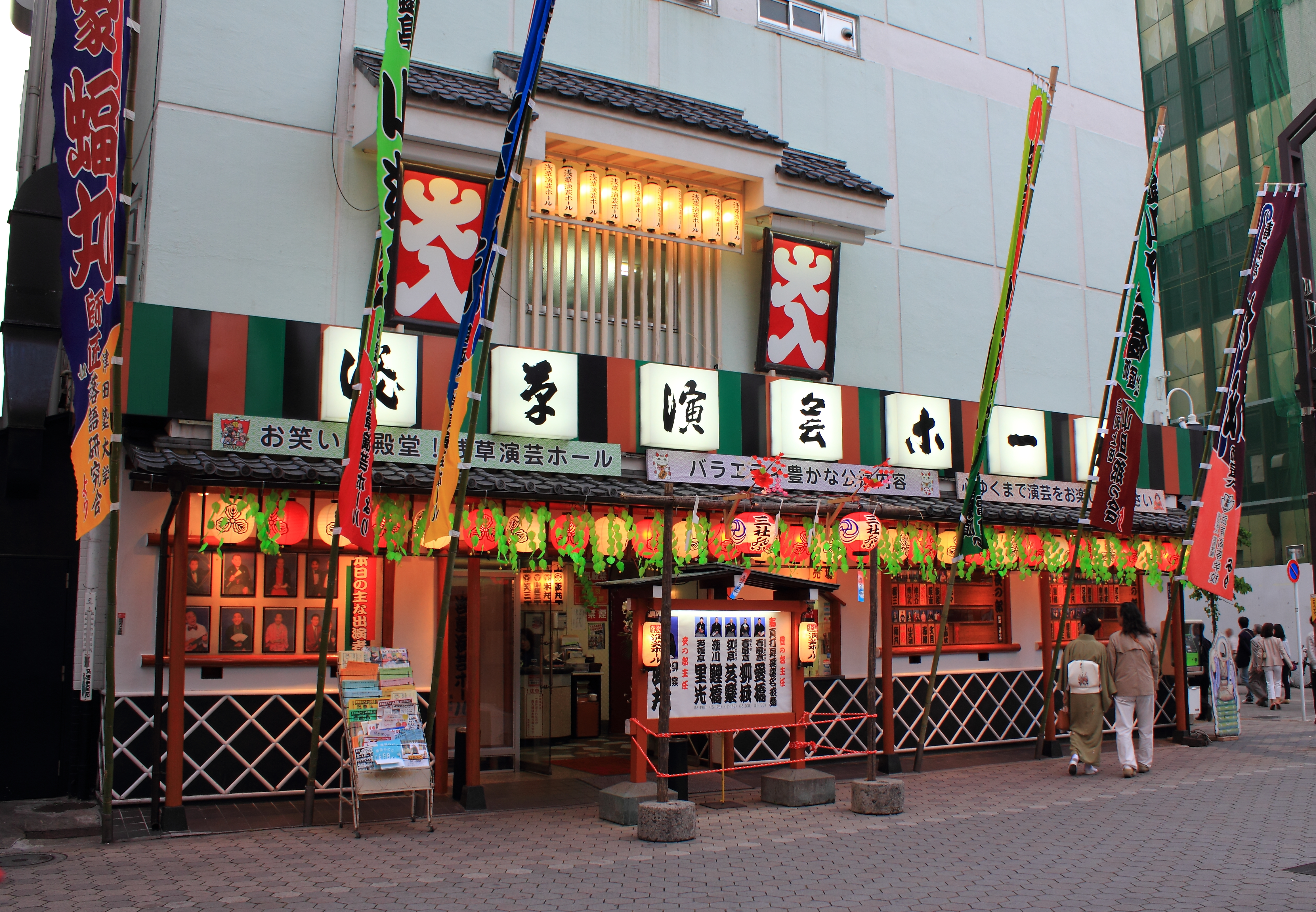 浅草演芸ホール（東京都台東区）